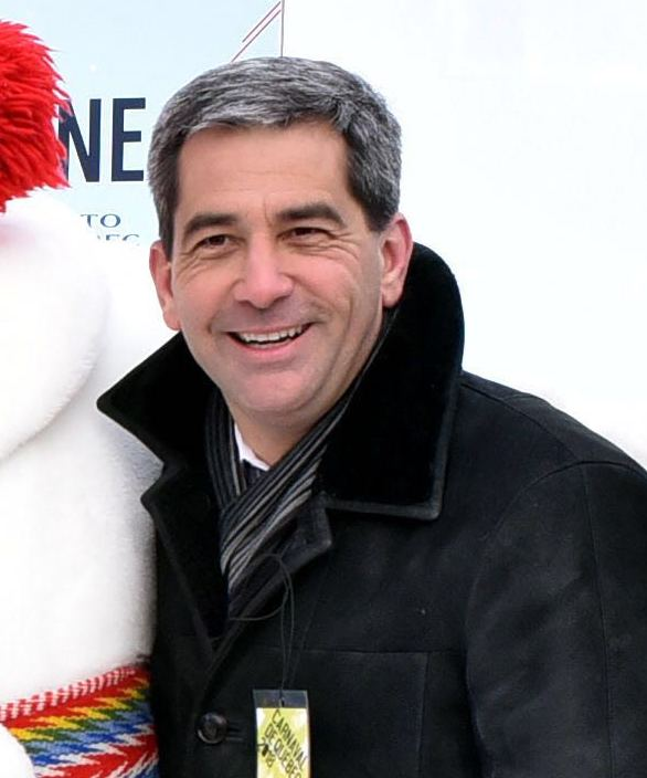 Merci à mes collègues Pierre Paul-Hus, Bernard Généreux, Joël Godin, Sylvie Boucher, Gérard Deltell et Alupa Clarke de nous avoir accueillis, ma famille et moi, alors que nous visitions Québec. Nous sommes tous dans la fourgonnette vers Ottawa. Thank you to my colleagues Pierre Paul-Hus, Bernard Généreux, Joël Godin, Sylvie Boucher, Gérard Deltell and Alupa Clarke for hosting me and my family while we visited Quebec City. We are all packed in the mini van and are Ottawa bound